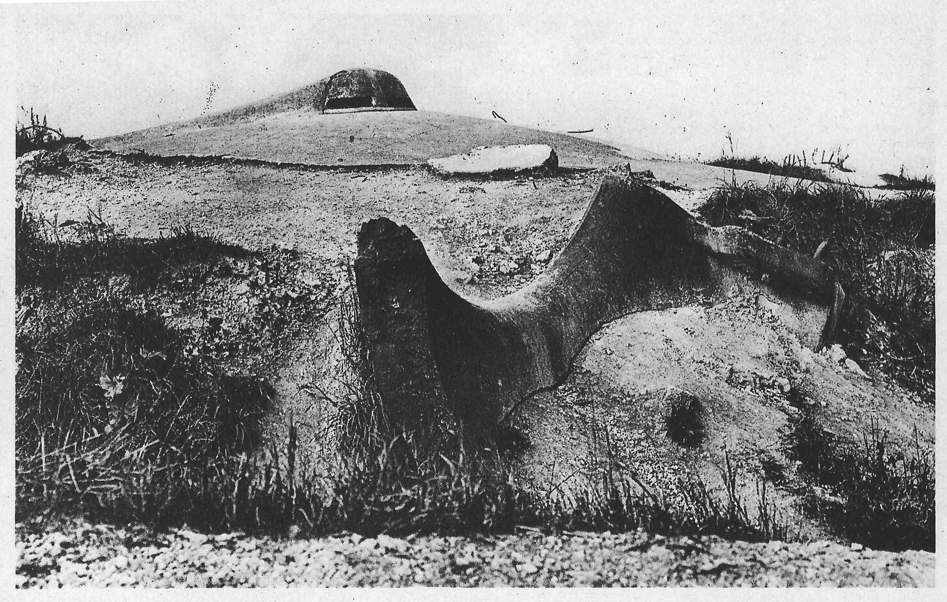 Observatoire_d'artillerie_face_à_la_Woevre_destructions_d'un_420. Carte postale des années 1920.